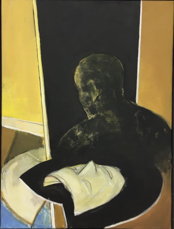 Maleri av den norske maleren Bjørn Krogstad: 2018. Akryl på lerret